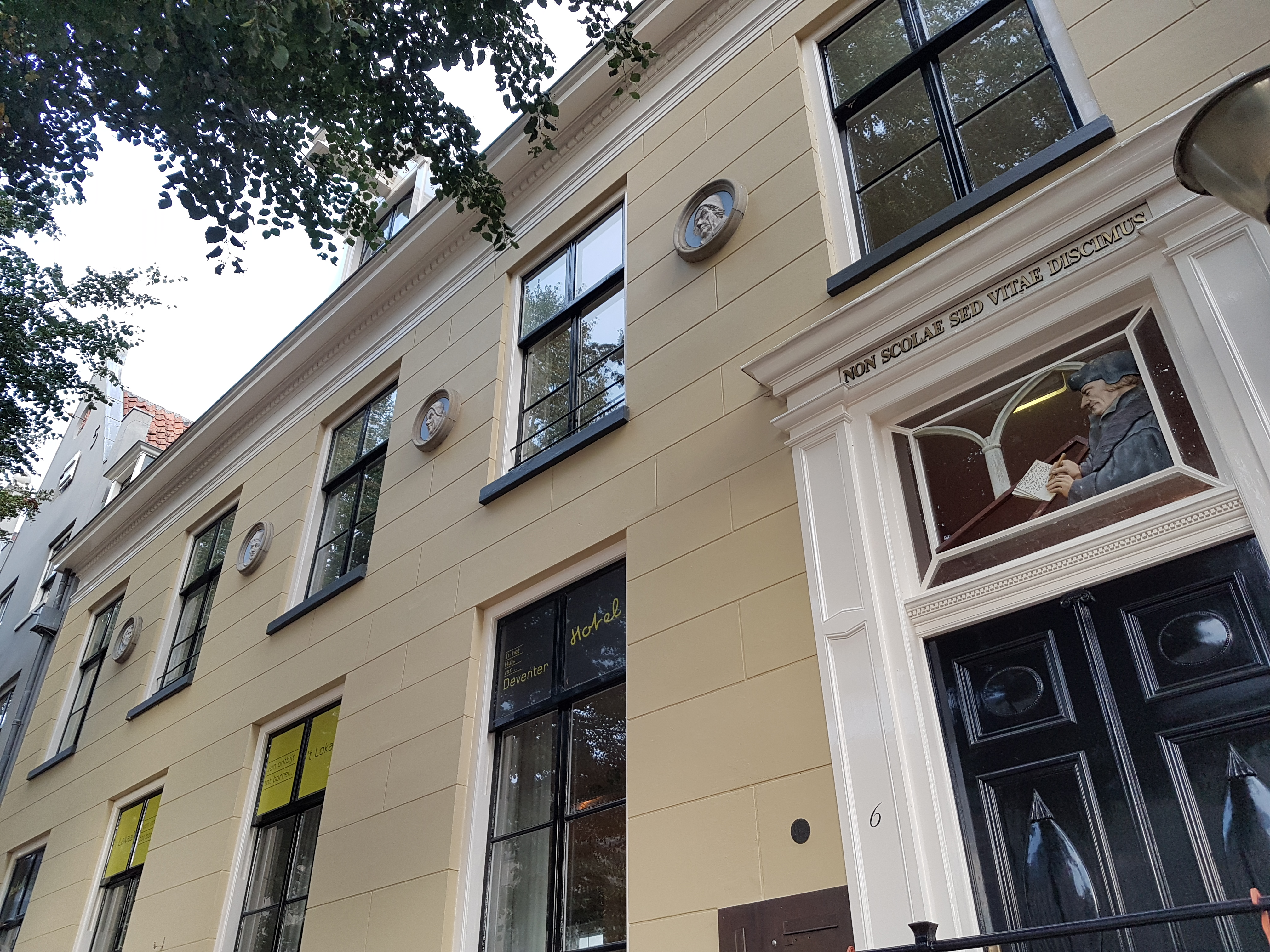 Op de voorgevel van de voormalige Latijnse School te Deventer zijn bij de restauratie in 1992 vier gedenkmedaillons aangebracht en in het bovenlicht een snijraam, allen van de hand van kunstenares Ela Venbroek-Franczyk. De medaillons geven Geert Grote, Thomas a Kempis, Adrianus VI en Alexander Hegius weer. In het snijraam is Desiderius Erasmus met de vijf namen afgebeeld.